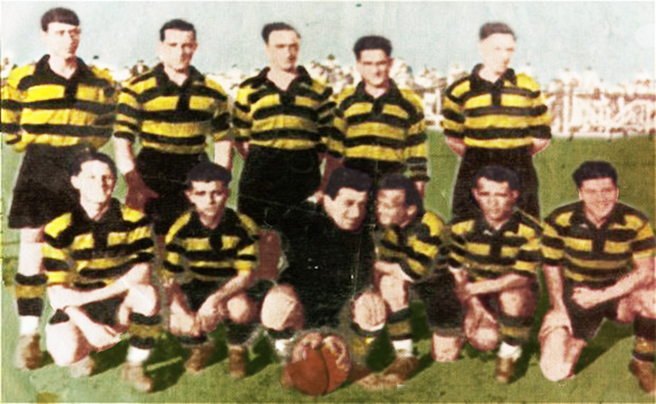 Η ομάδα της ΑΕΚ Κυπελλούχος το 1932. Χρωματική επεξεργασία από το user Sportingn